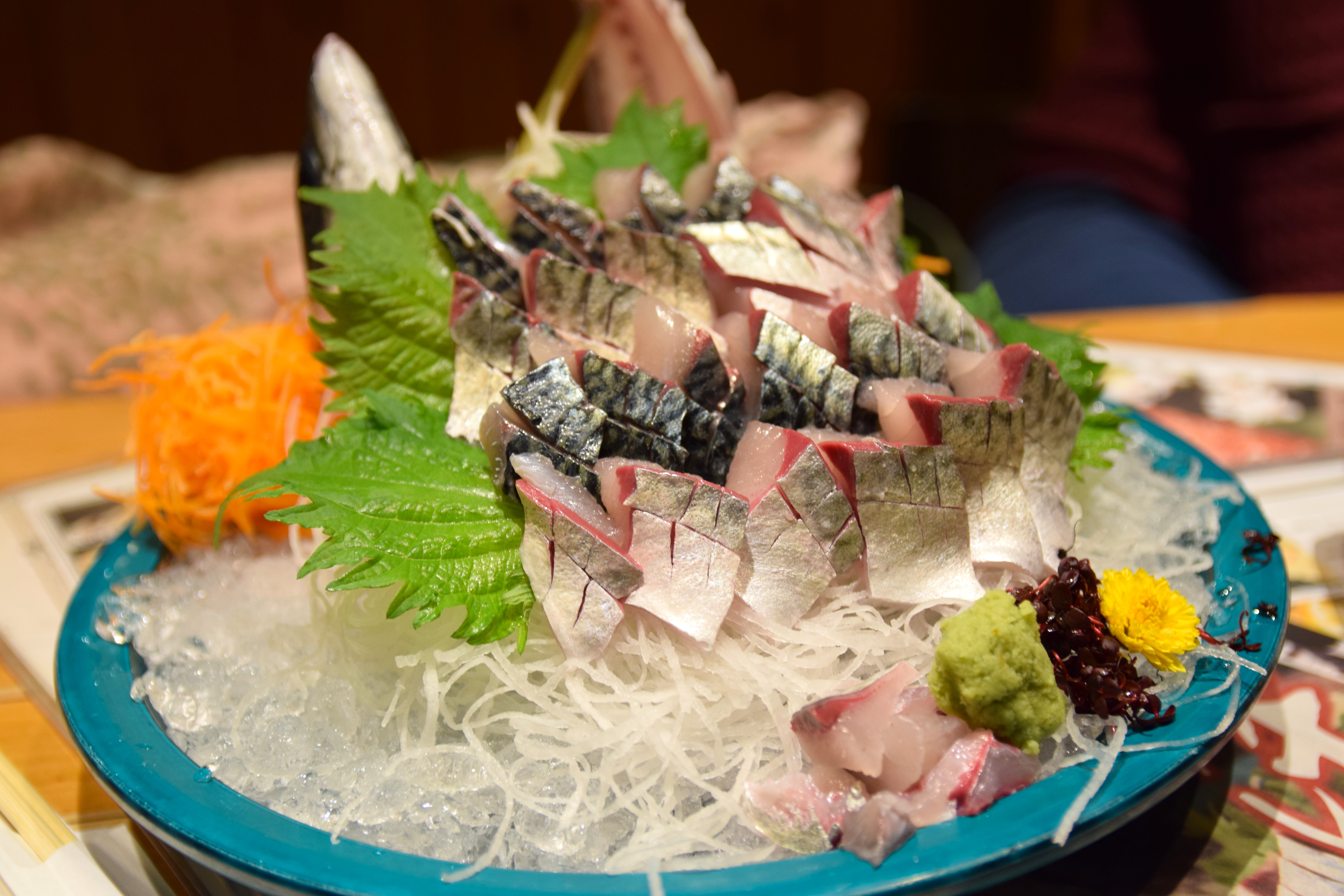 Сасими